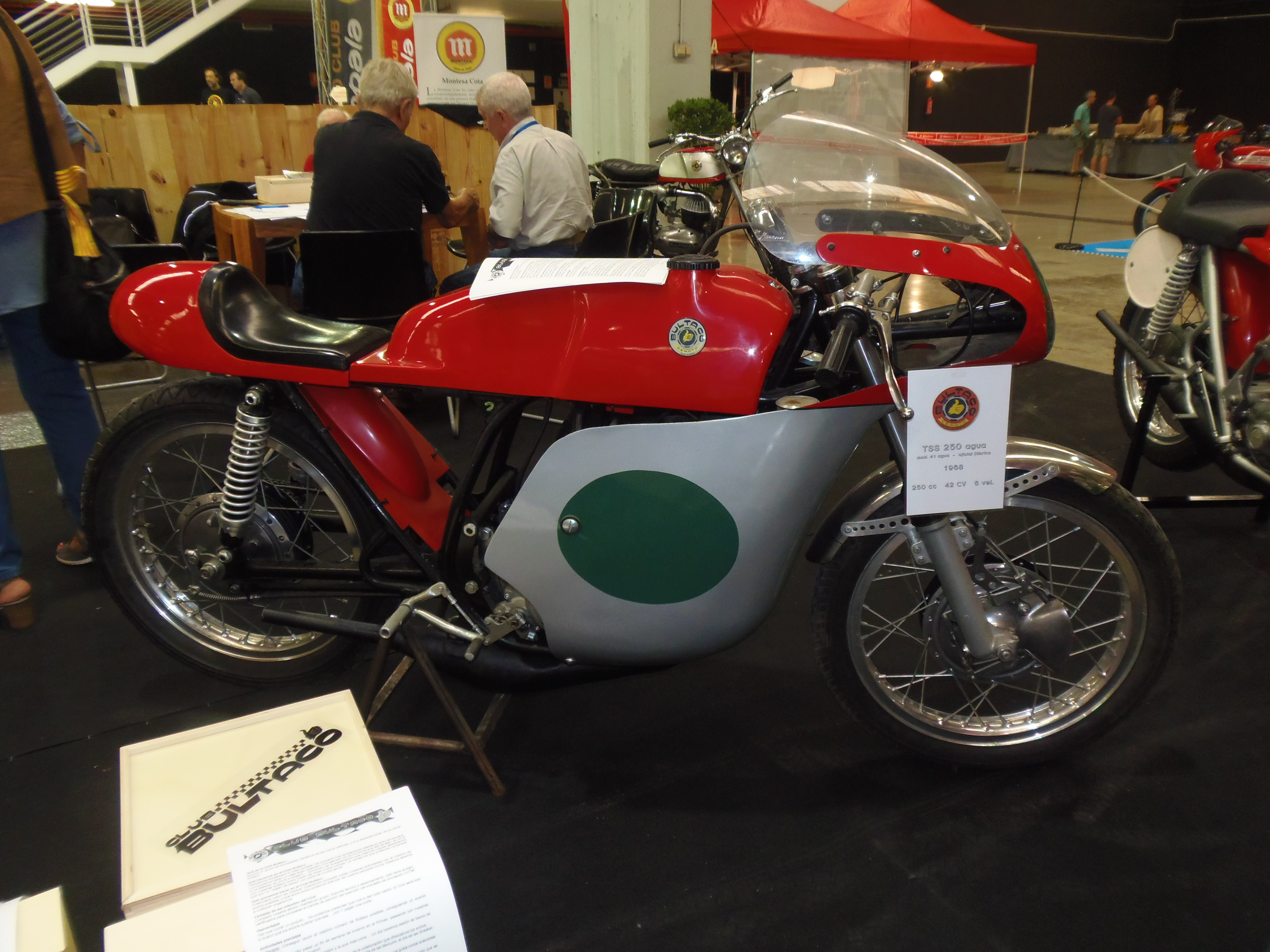 Bultaco TSS 250 "Agua", mod. 41, 1968